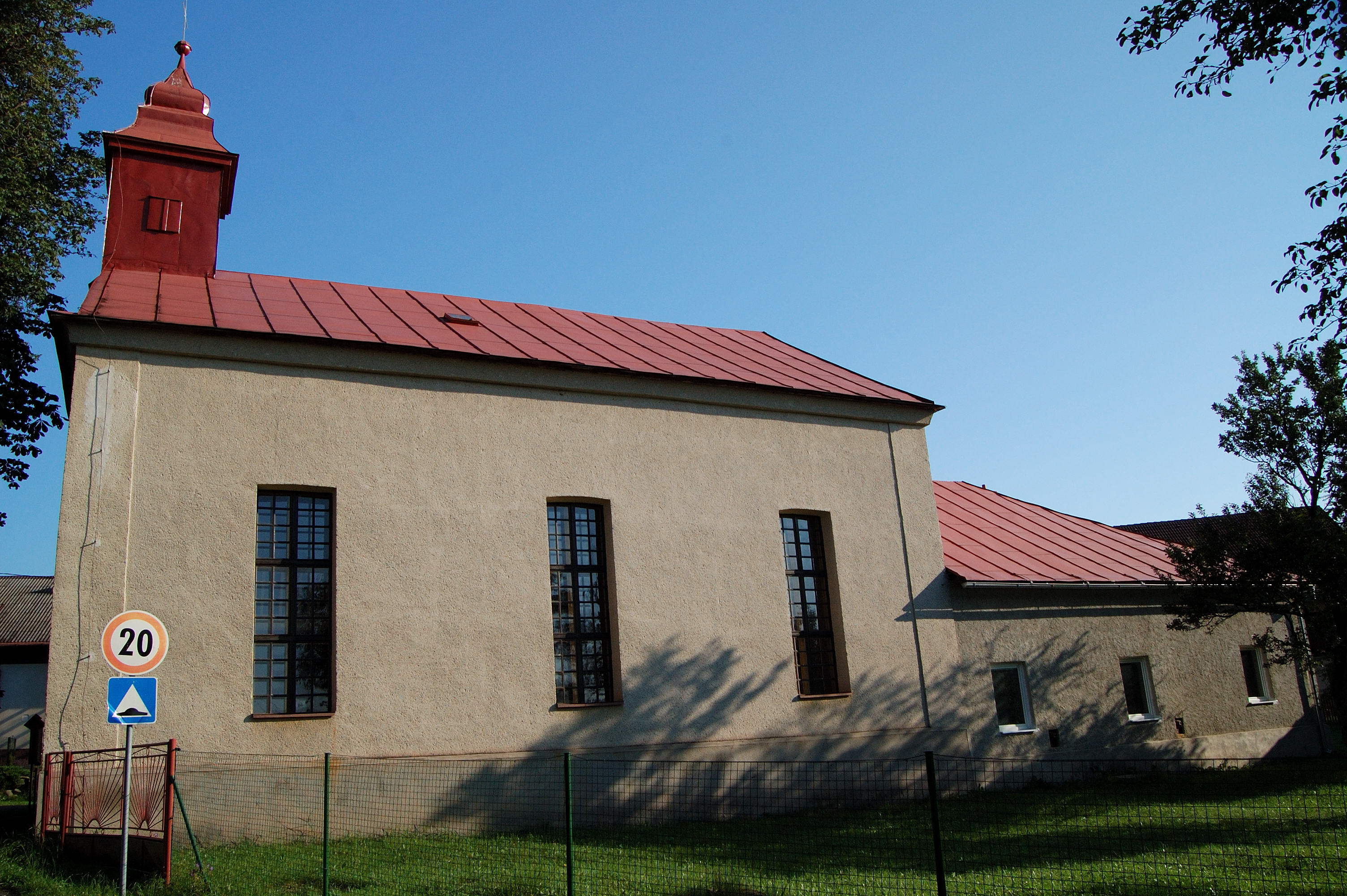 kostol v obci Stola